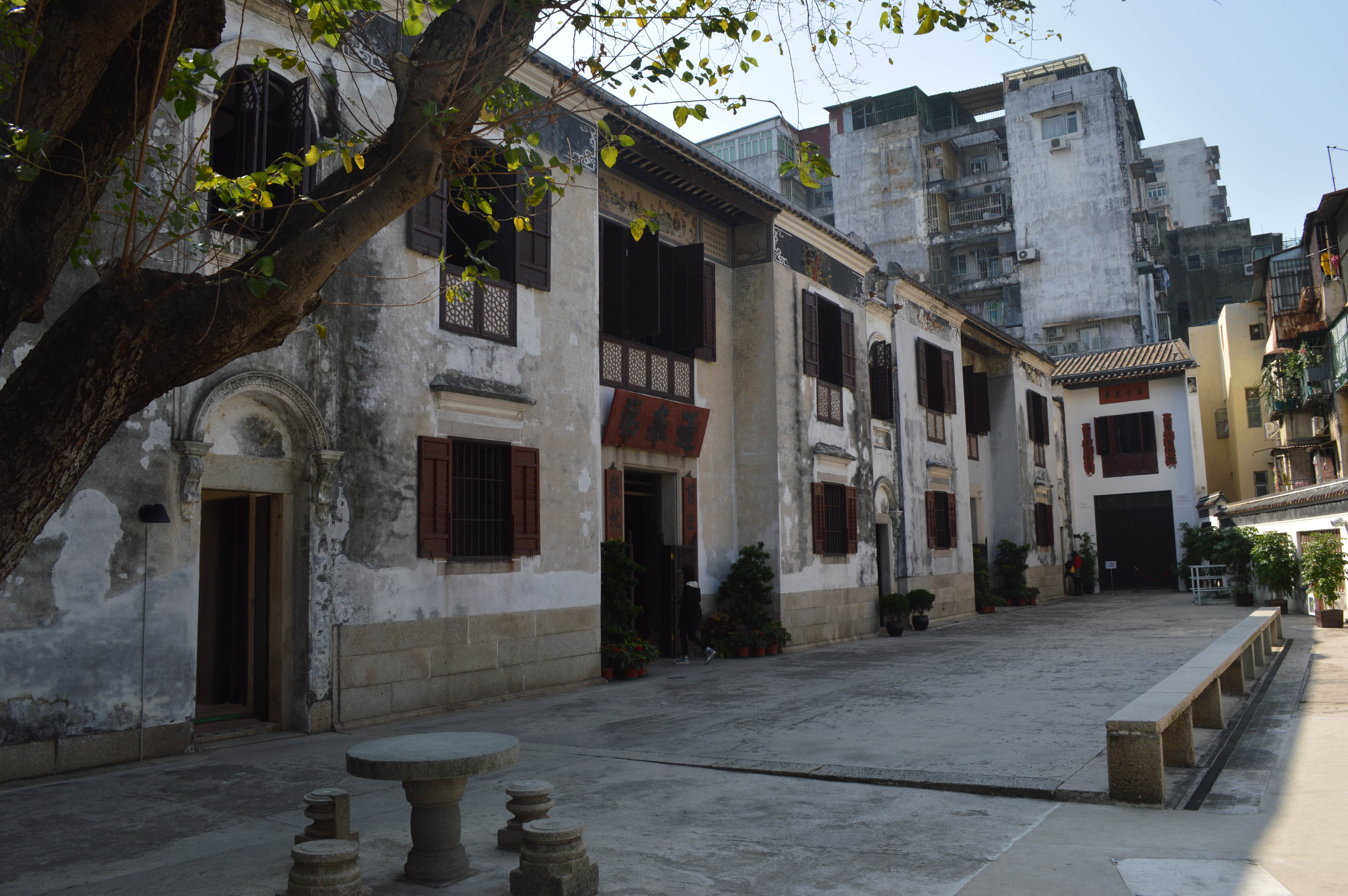 澳门郑家大屋内庭院一景